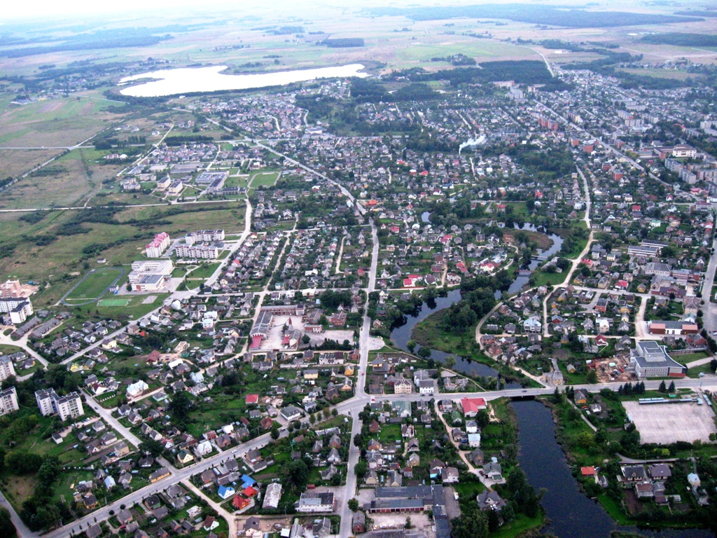 Biržai. Fotografuota 2009-09-15. Autorius aš.